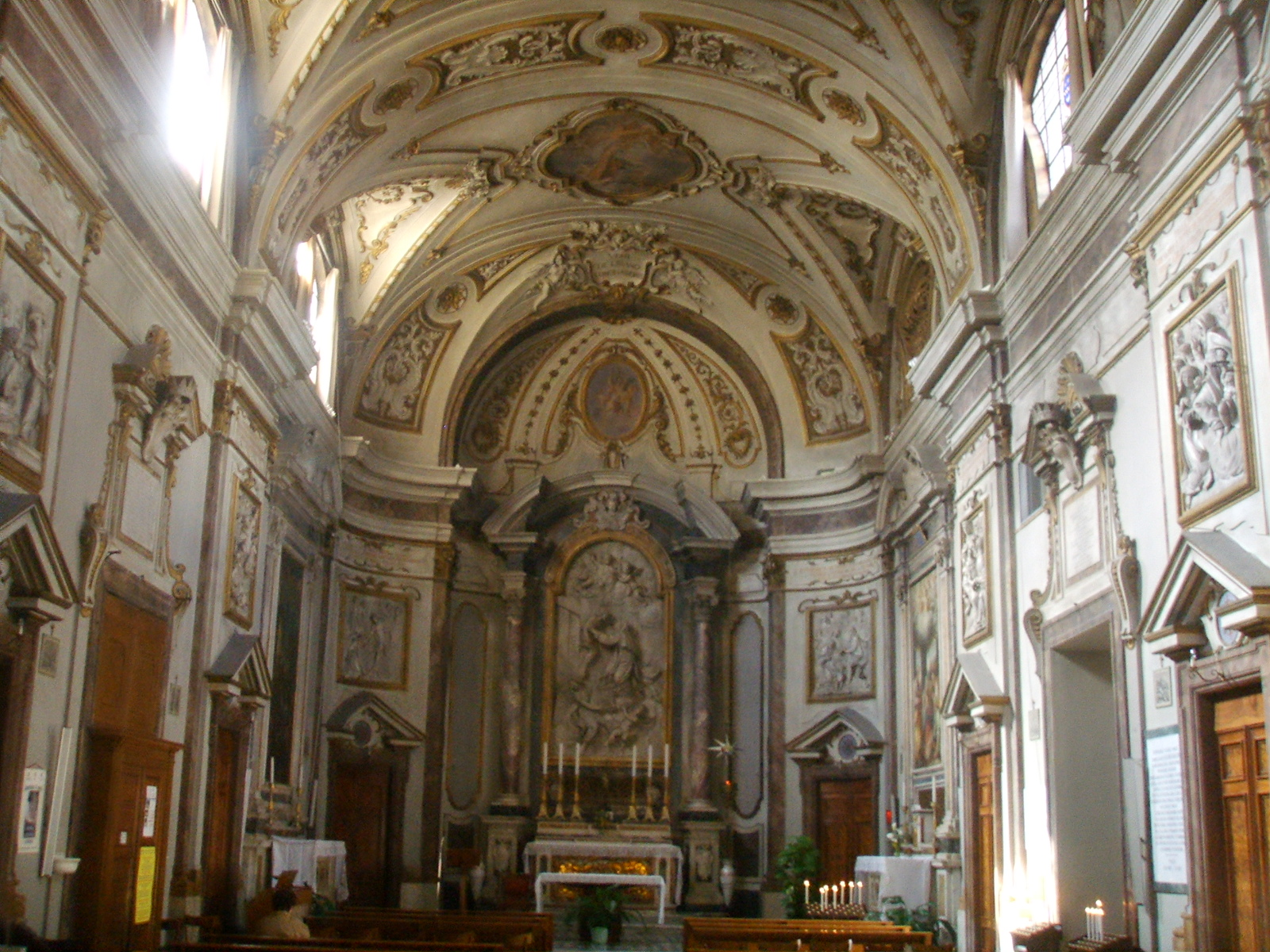 Basilica_di_Santa_Caterina_de'_Ricci inside